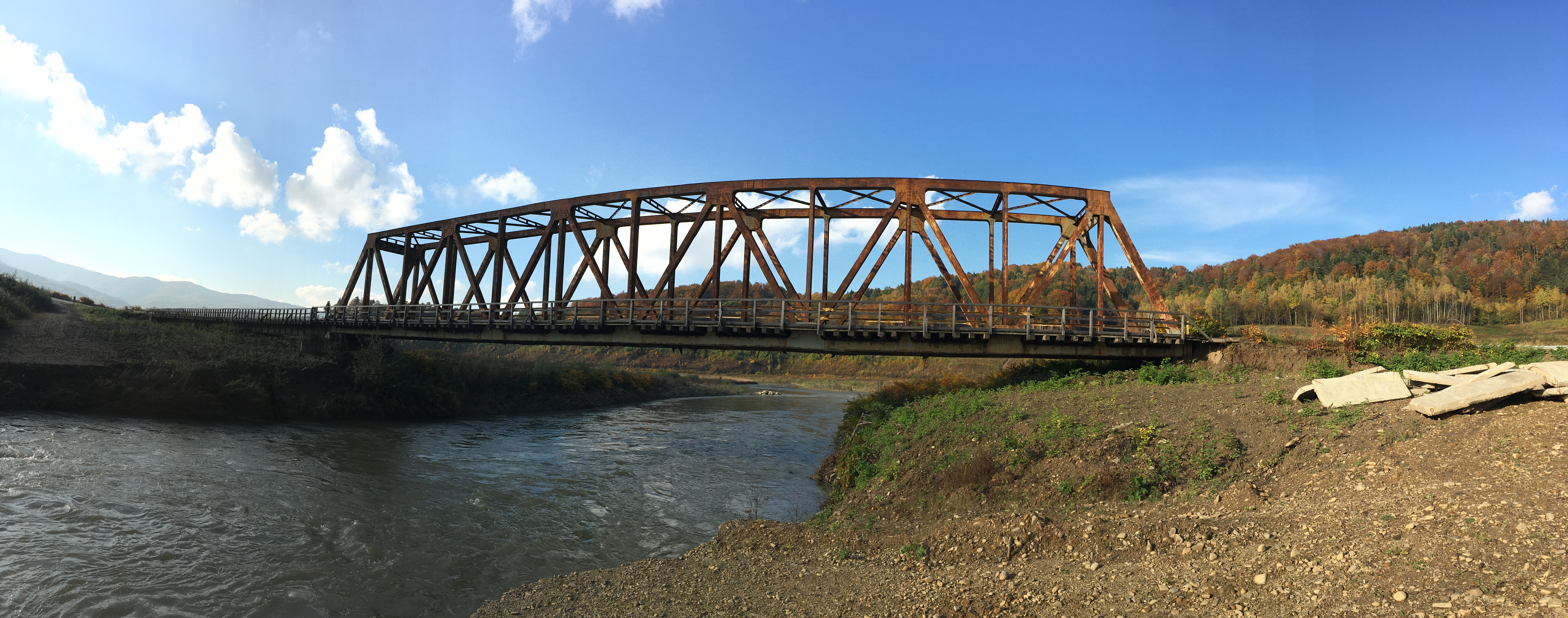 Panorama mostu na Skawie w Mucharzu Brańkówce.